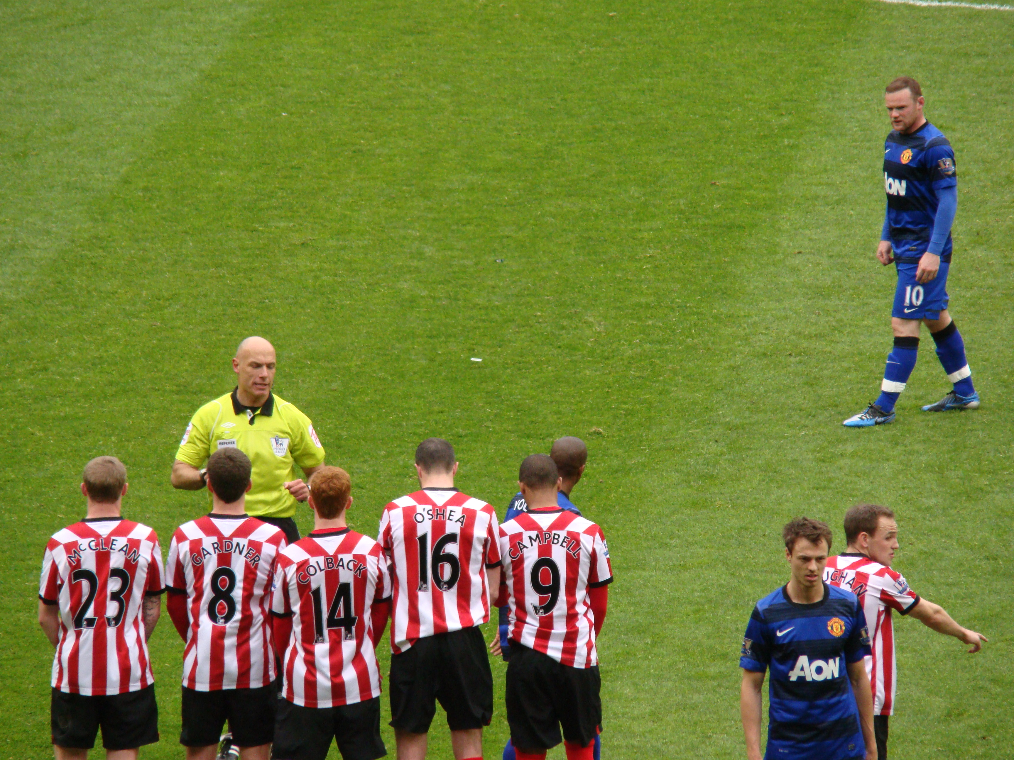 Wayne Rooney free kick